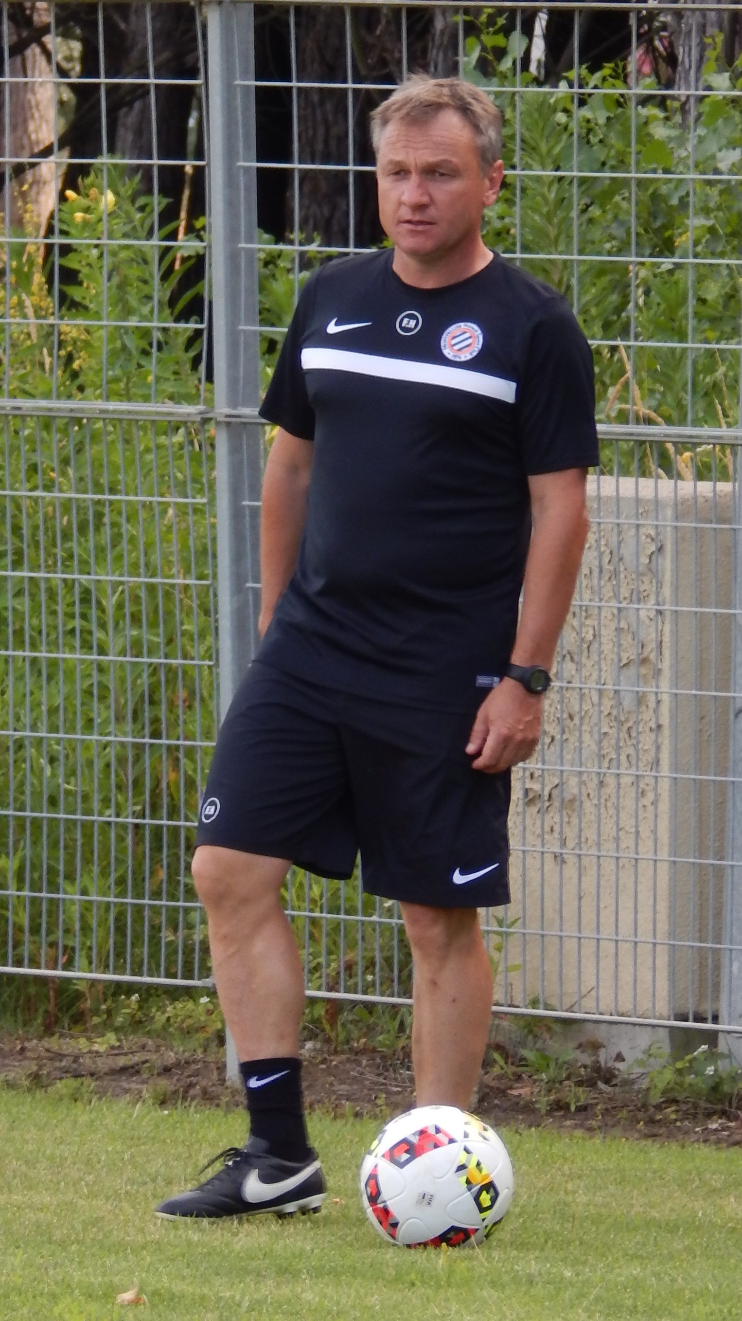 Frédéric Hantz (MHSC), juillet 2016.